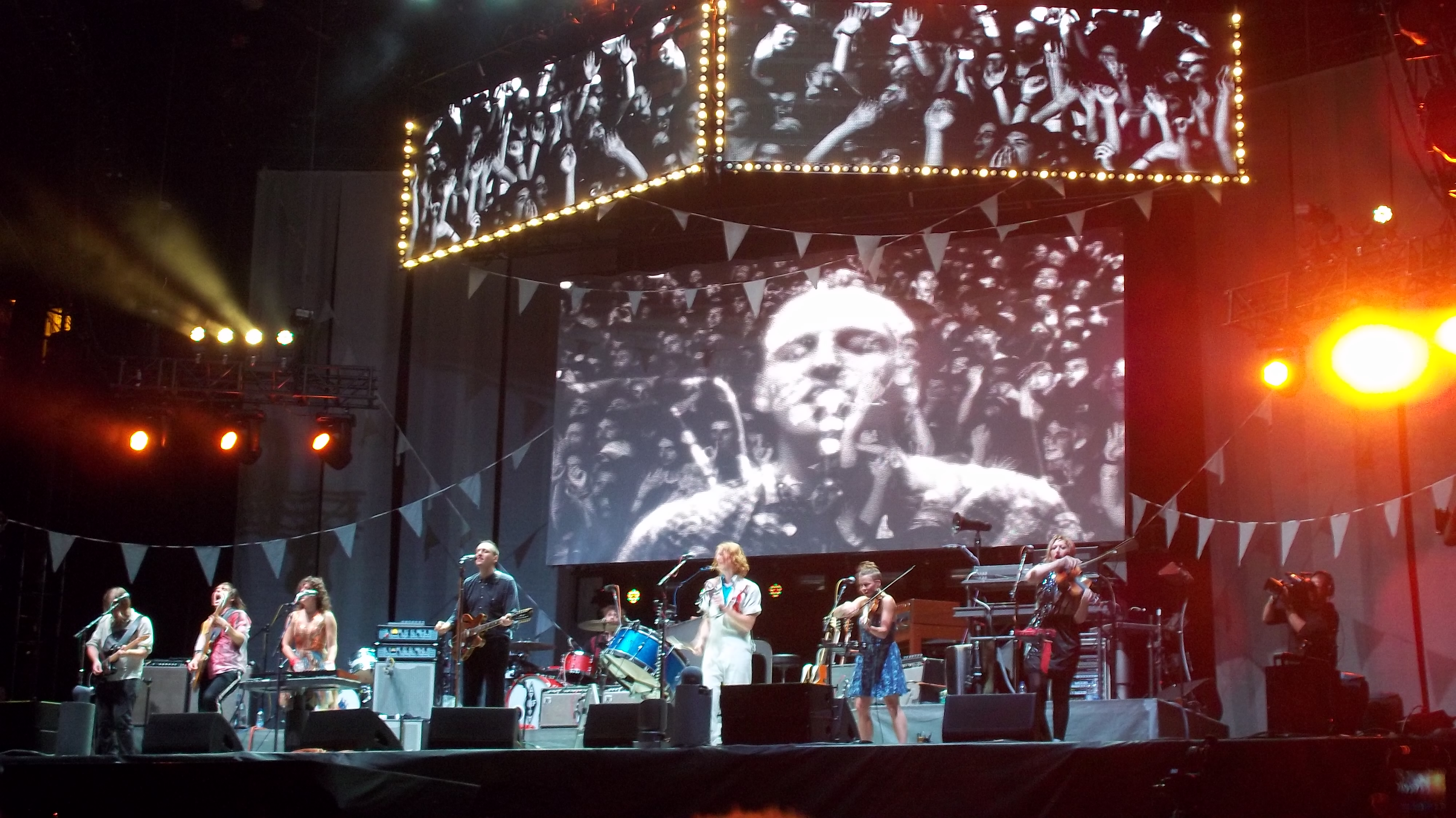 Spectacle gratuit d'Arcade Fire présenté et diffusé en direct par SiriusXM Canada le 22 septembre 2011 à 21:00 à la place des Festivals de Montréal